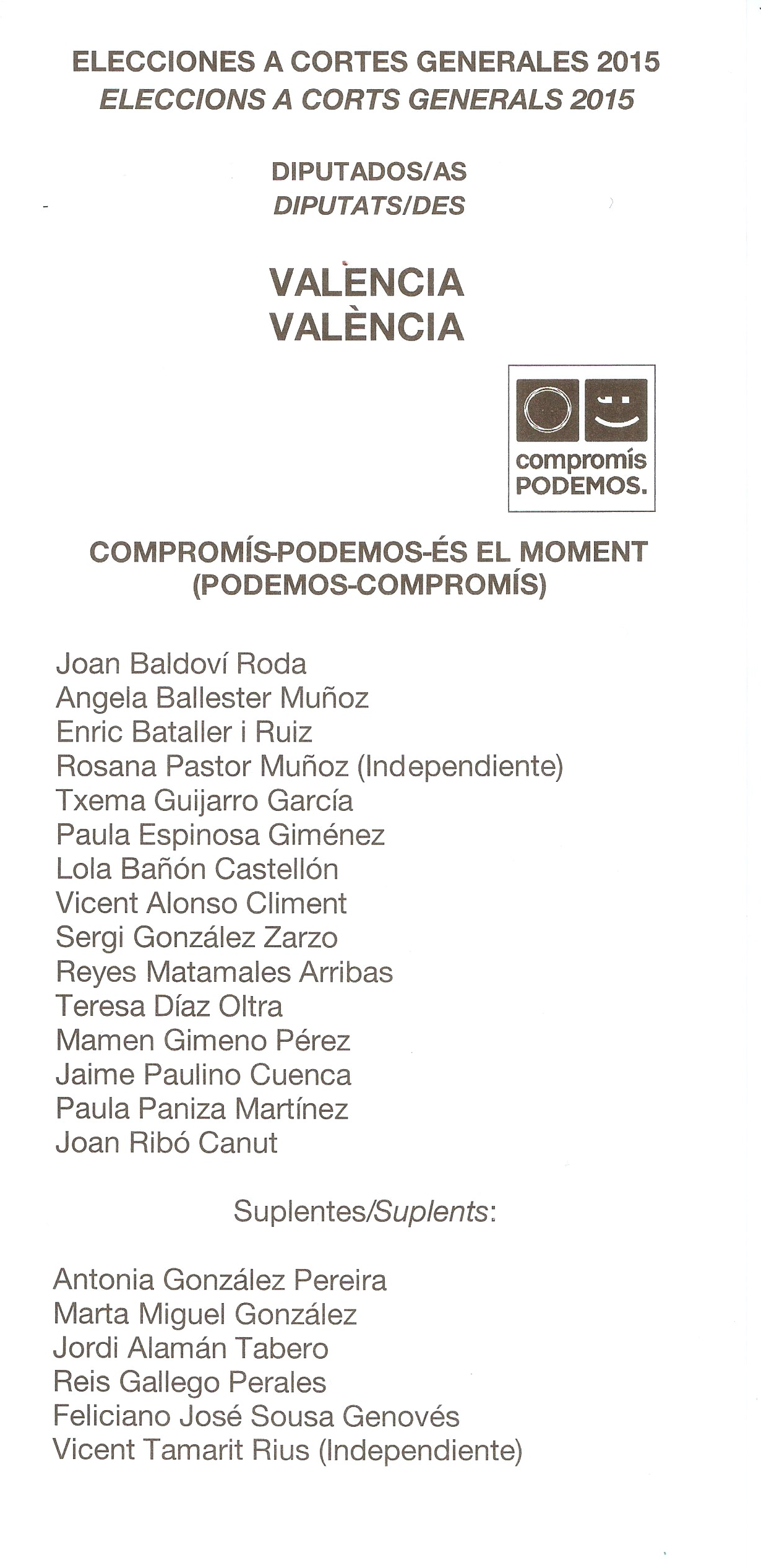 Papeleta de Compromís - Podemos - És el Moment para el Congreso por Valencia.